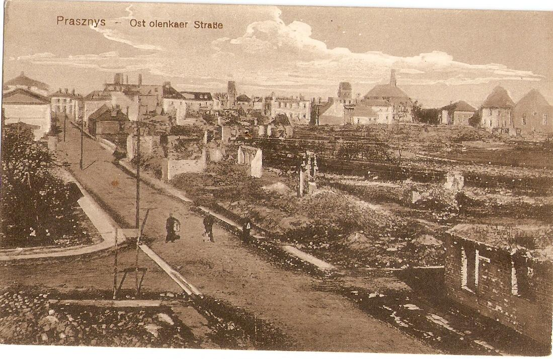 Zniszczony Przasnysz 1915r.na skutek działań wojennych